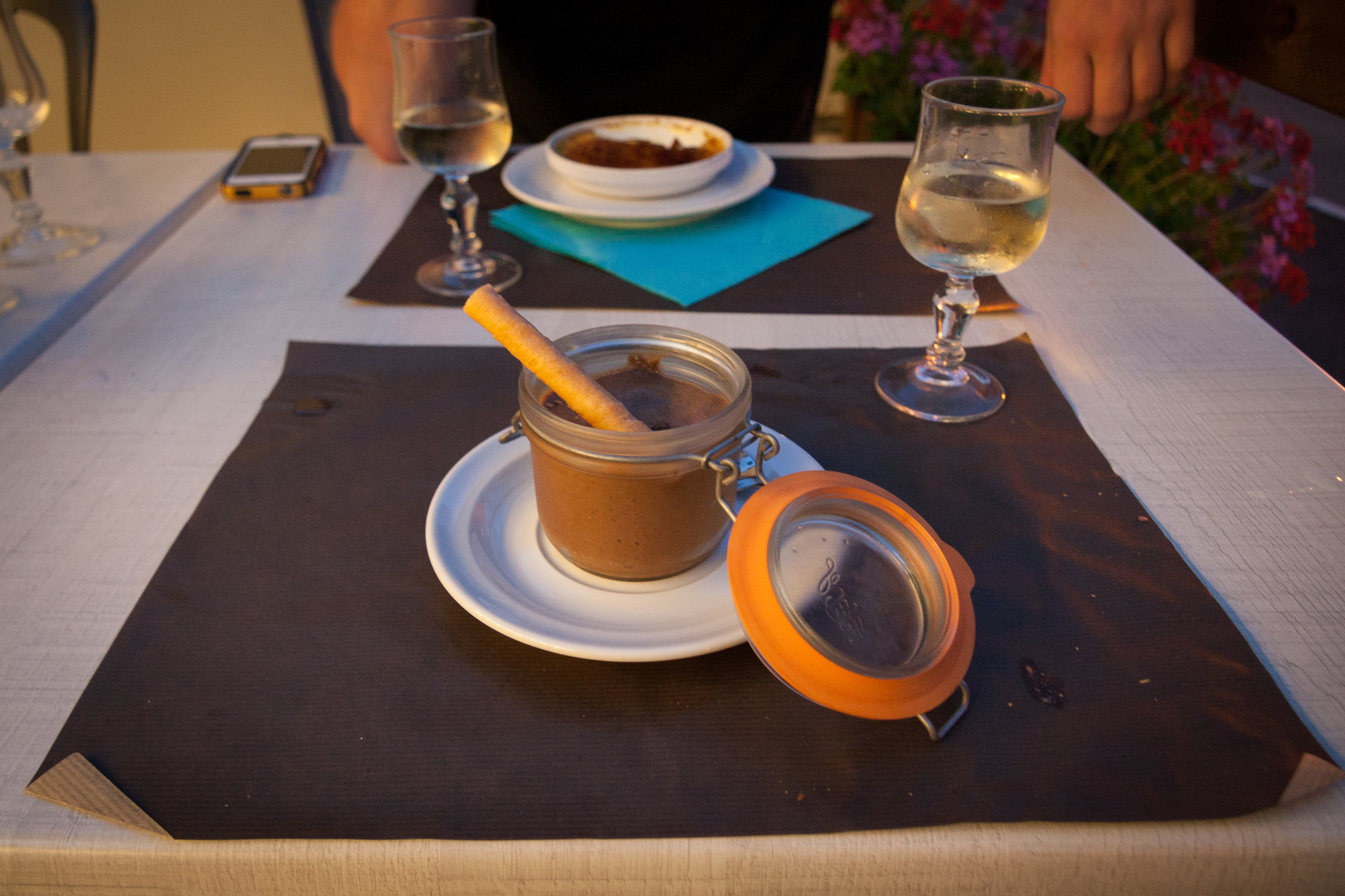 AOC Seyssel dessert